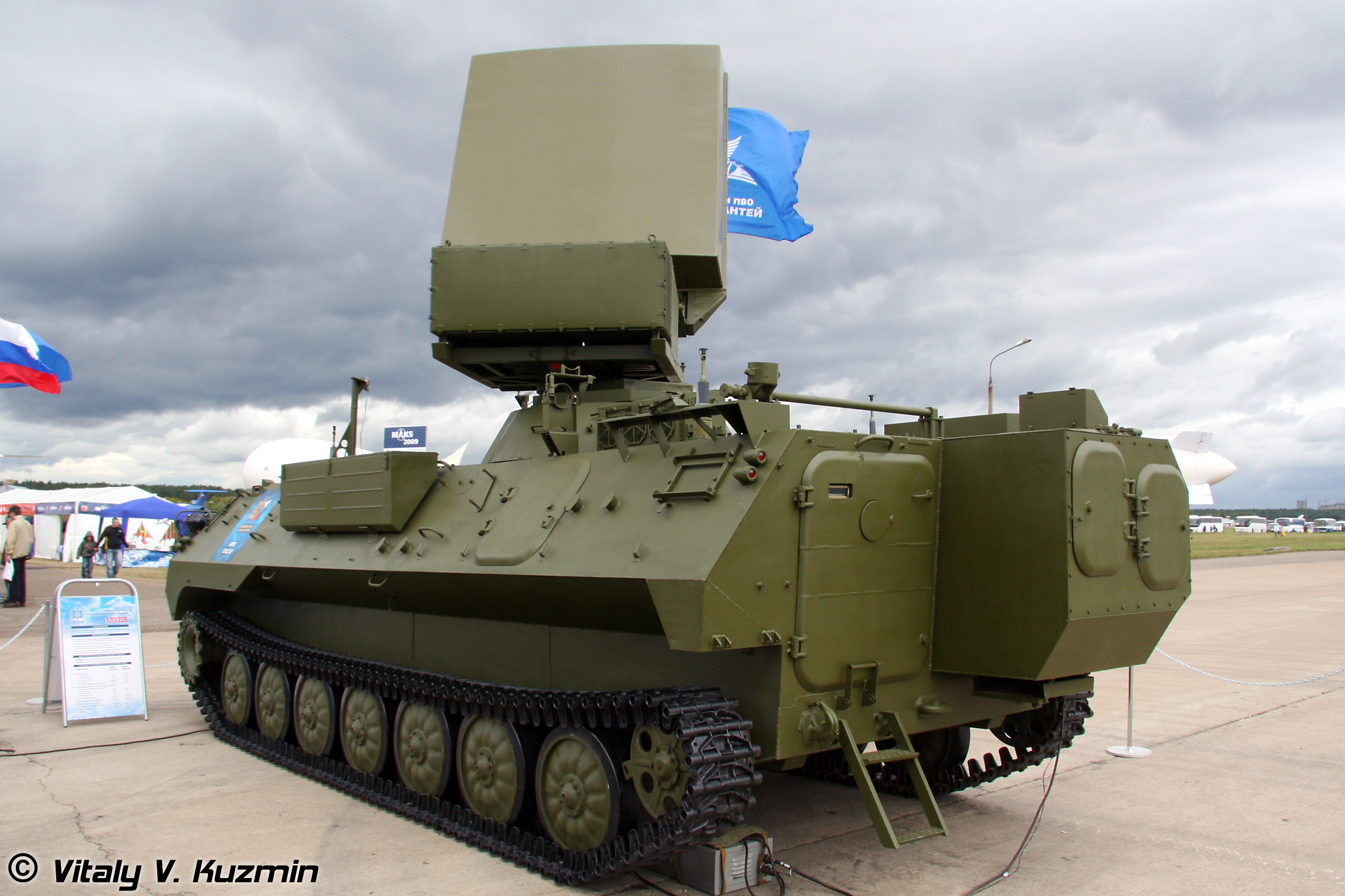 Мобильная РЛС 1Л122-2Е (Mobile radar 1L122-2E)